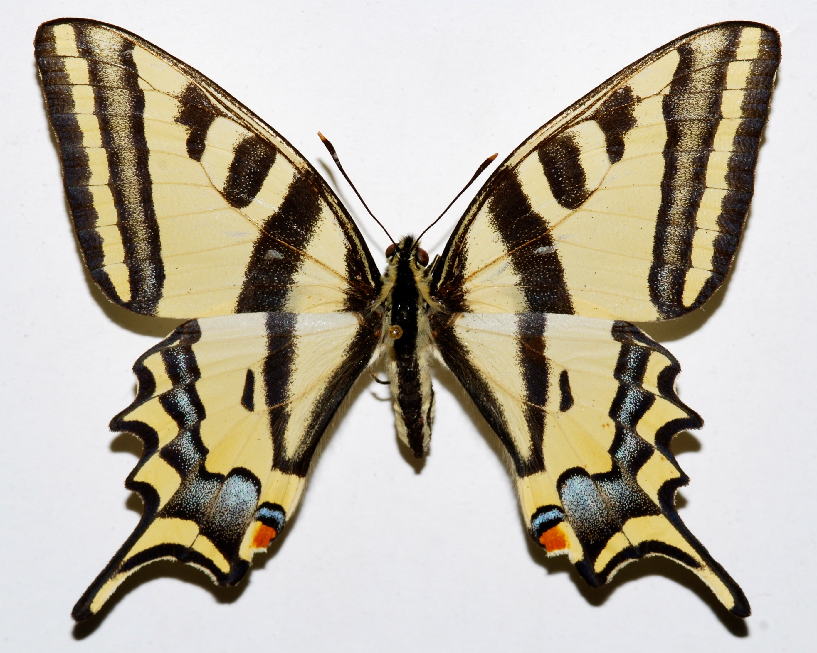 Karahalli, Usak, TURKEY